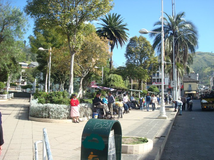 S.J Chimbo